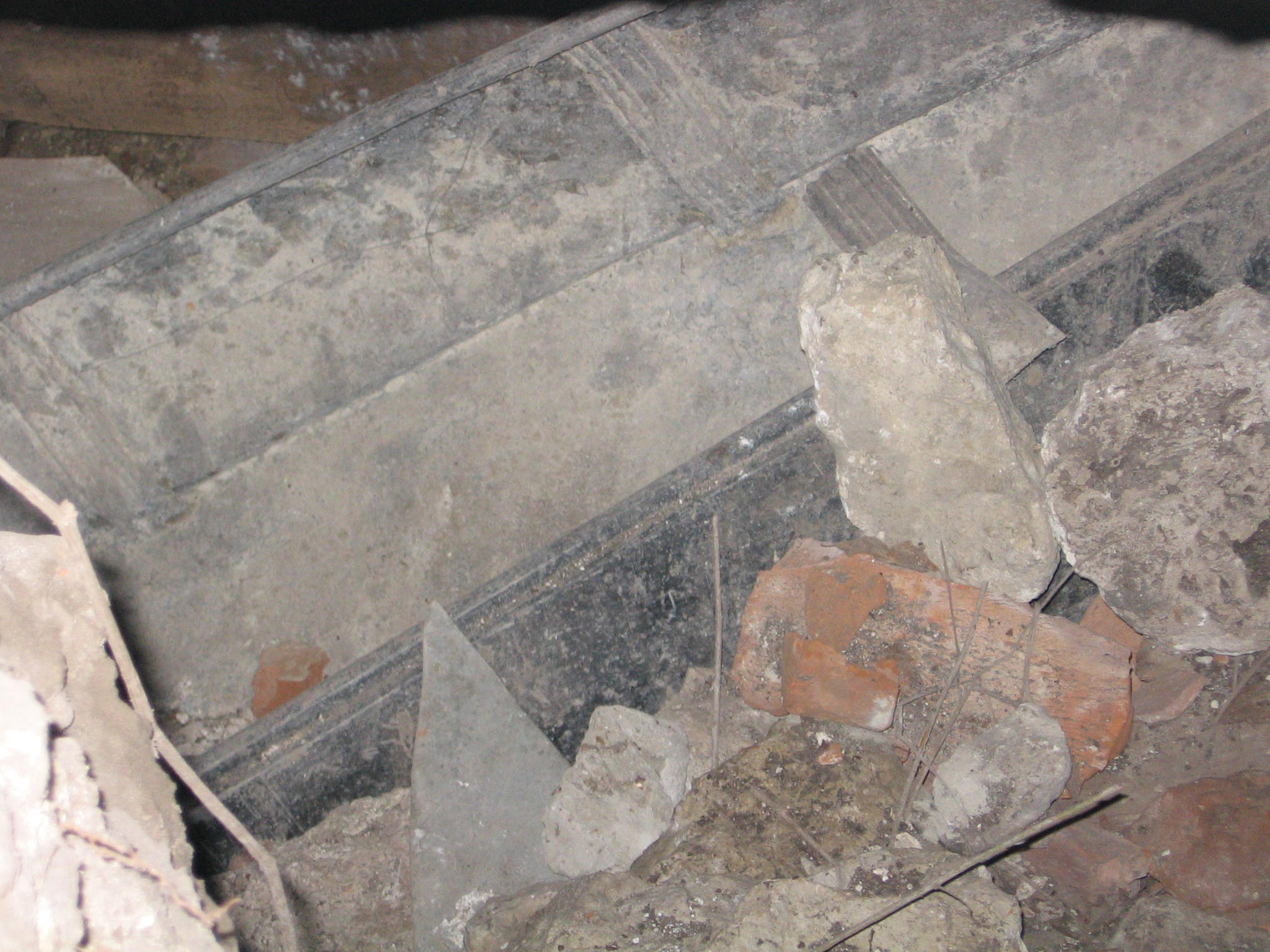 Усипальниця Ценських у Вікні на Покутті. Крипта.